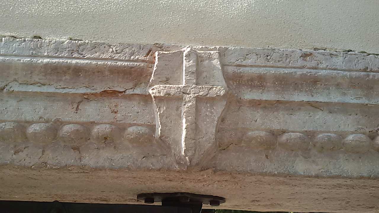 Stemma del comune di verona sulla porta d'ingresso alla sorgente Brentella